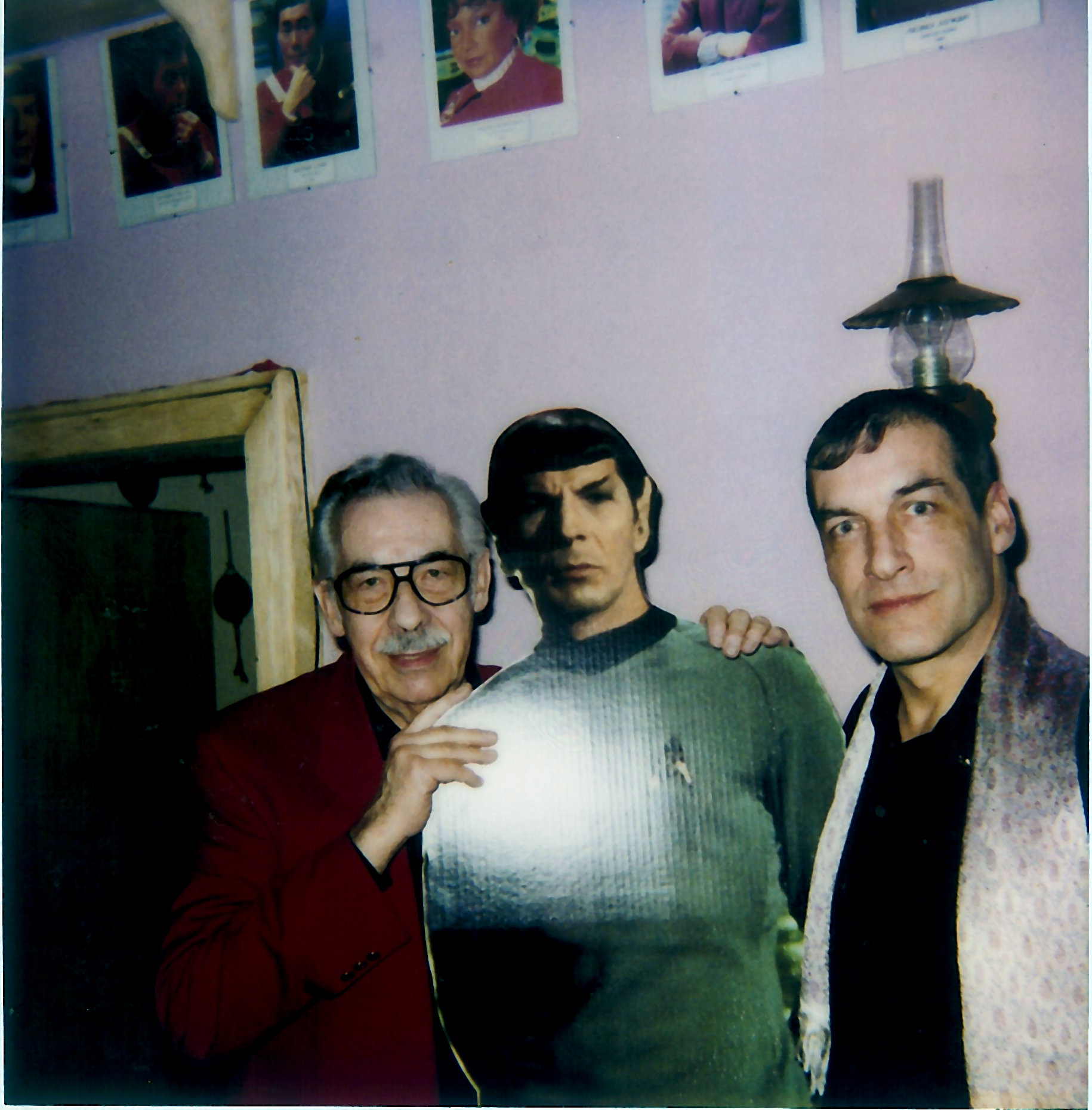 Schauspieler und Synchronsprecher Raimund Krone (deutsche Stimme von Ltd. Worf) (rechts) mit seinem Schauspiel- und Synchronkollegen Herbert Weicker (deutsche Stimme von Spock) 1994 auf der Star Trek Convention in Mannheim